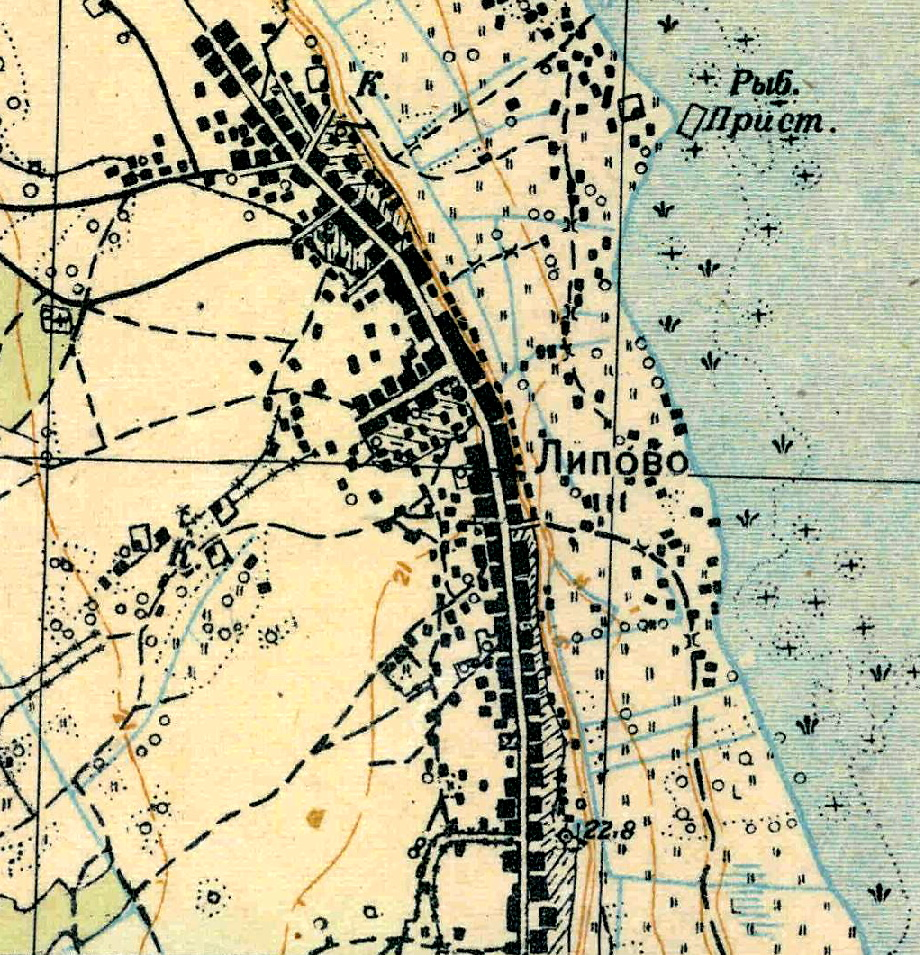 Топографическая карта Ленинградской области, квадрат О-35-9-В-б (Липово), деревня Липово